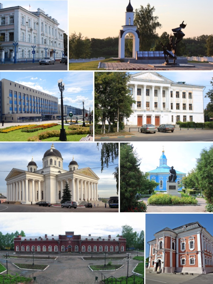 Коллаж из фотографий для статьи о Арзамасе